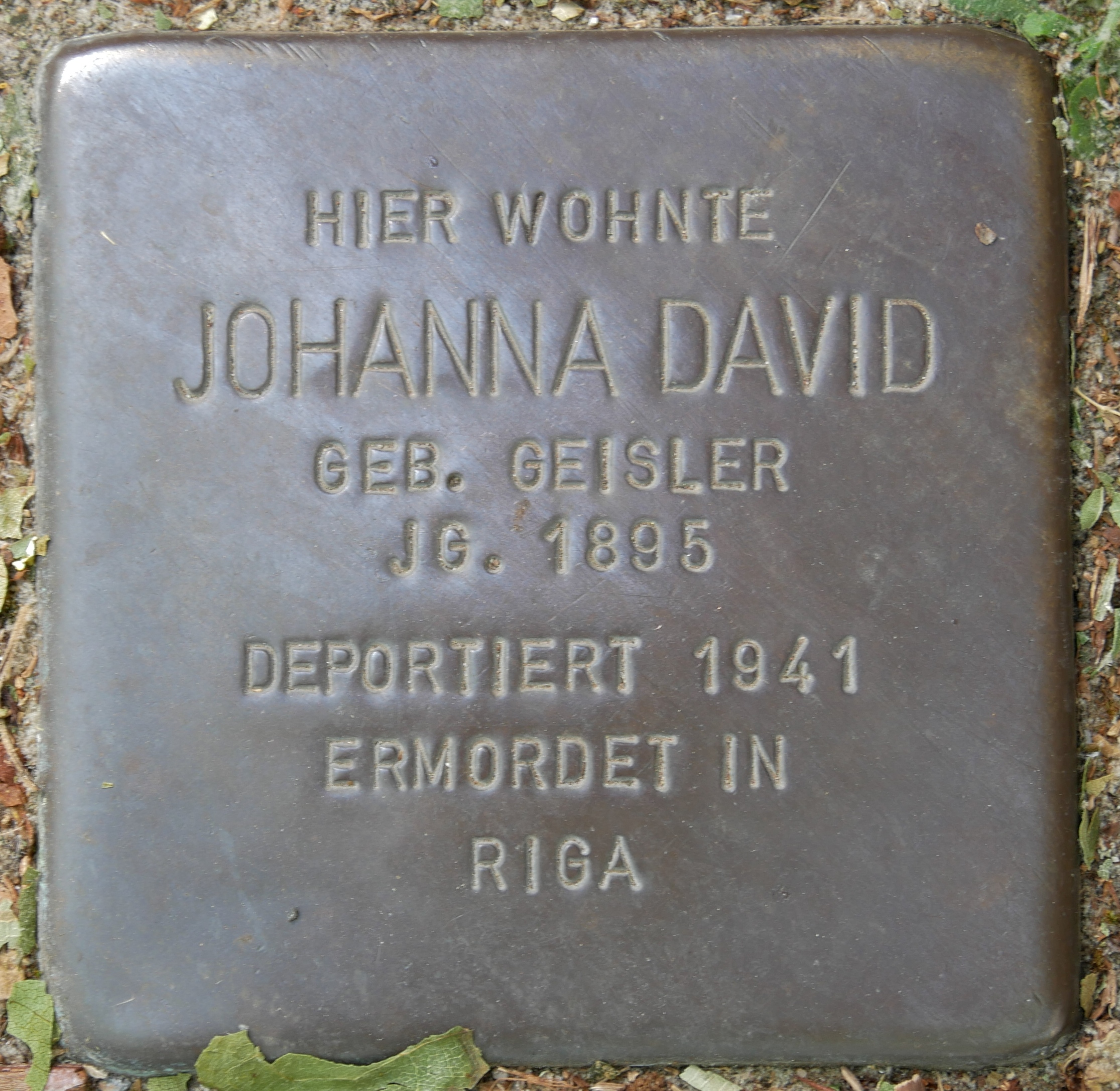 Stolpersteine Wesel: David, Johanna